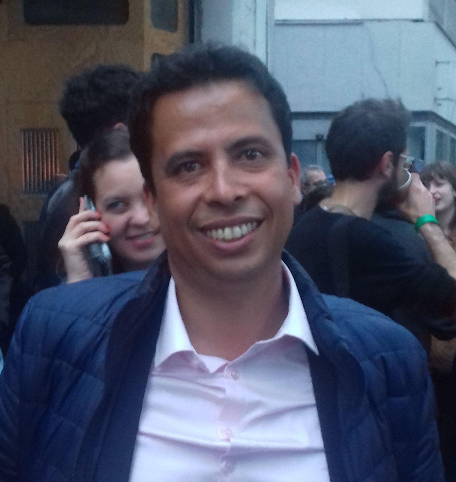 Mounir Satouri le soir de son élection comme député européen, le 26 mai 2019.